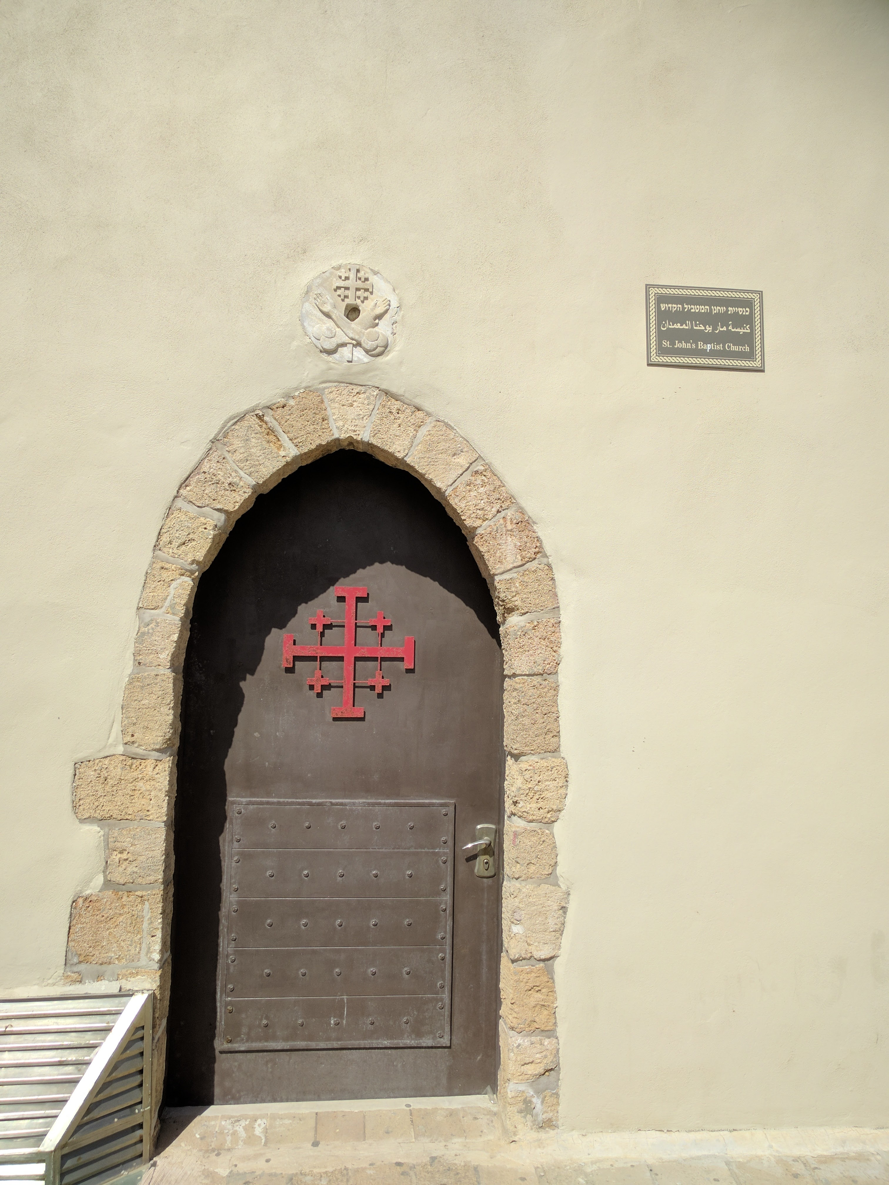 העיר העתיקה של עכו תחומה על ידי מי הים בצדה הדרום-מזרחי, הדרומי והמערבי, והיא מוקפת בחומה בכל צדדיה. בצדה הצפוני ובצדה המזרחי הפונים אל היבשה, כוללים הביצורים גם חפיר.